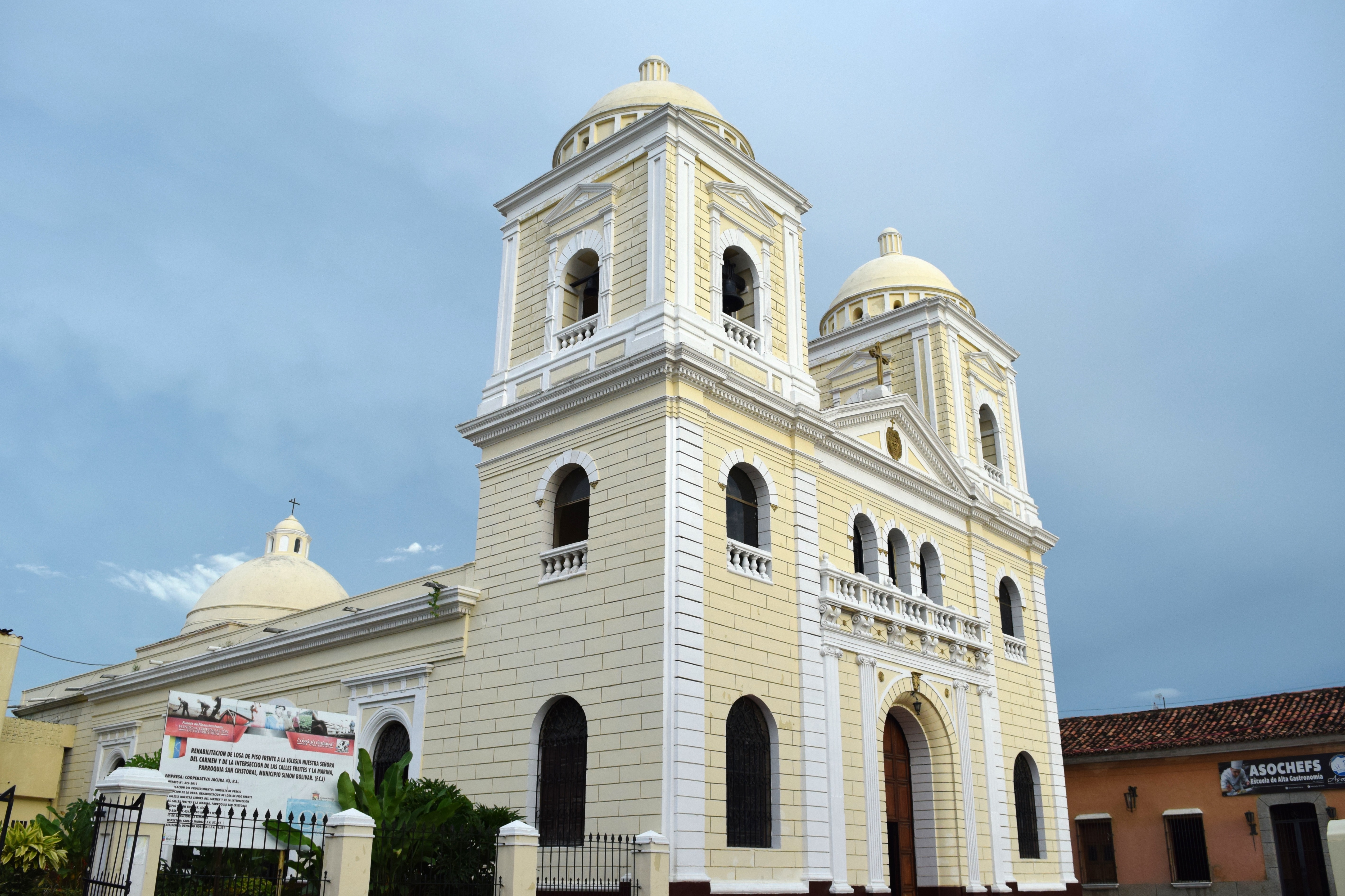 Perspectiva de la Ermita del Carmen